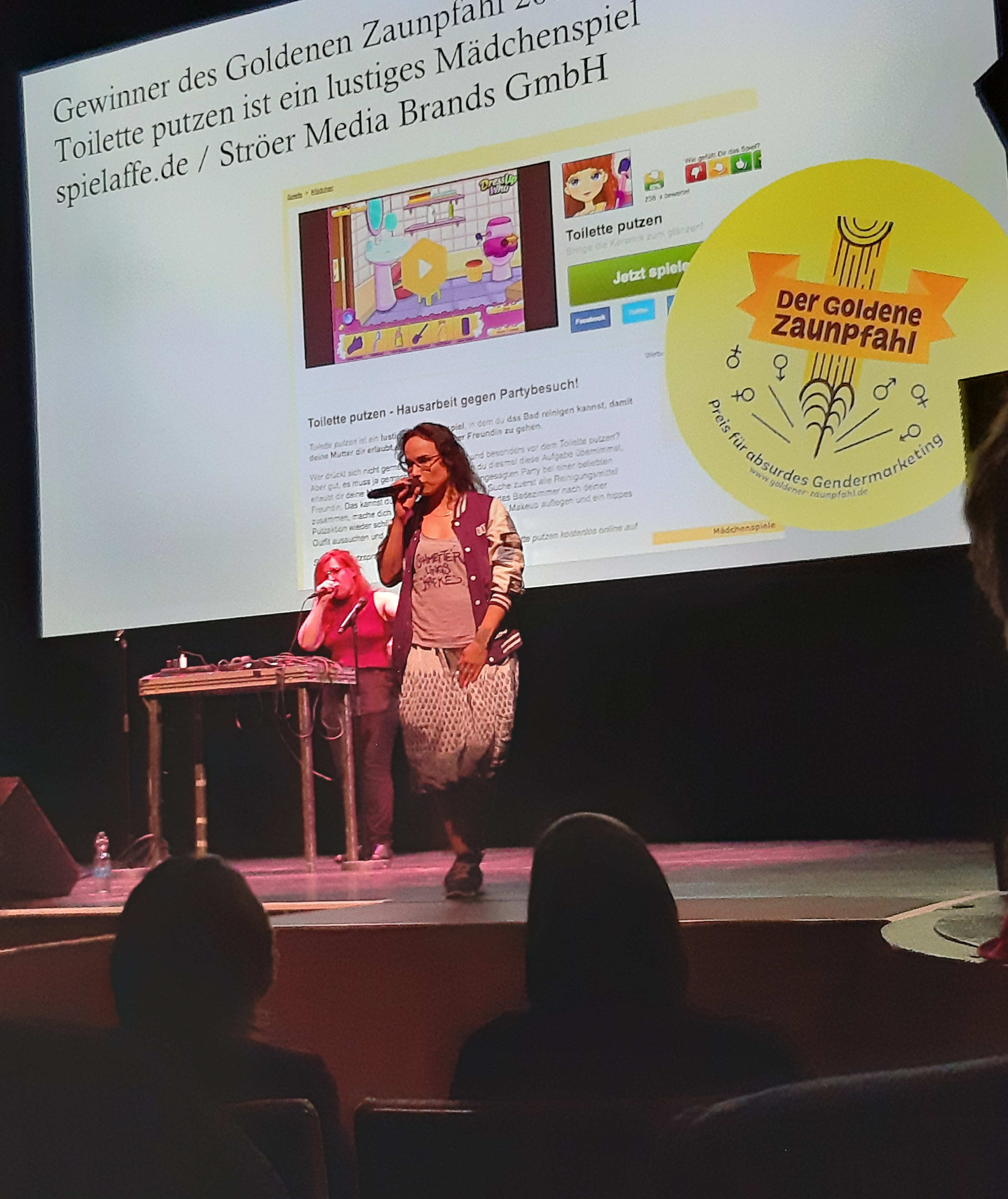 Lia Sahin sorgt zusammen mit Sookee für die musikalischen Höhepunkte der Preisverleihung am 22.05.2019 im HAU Hebels am Ufer, Berlin